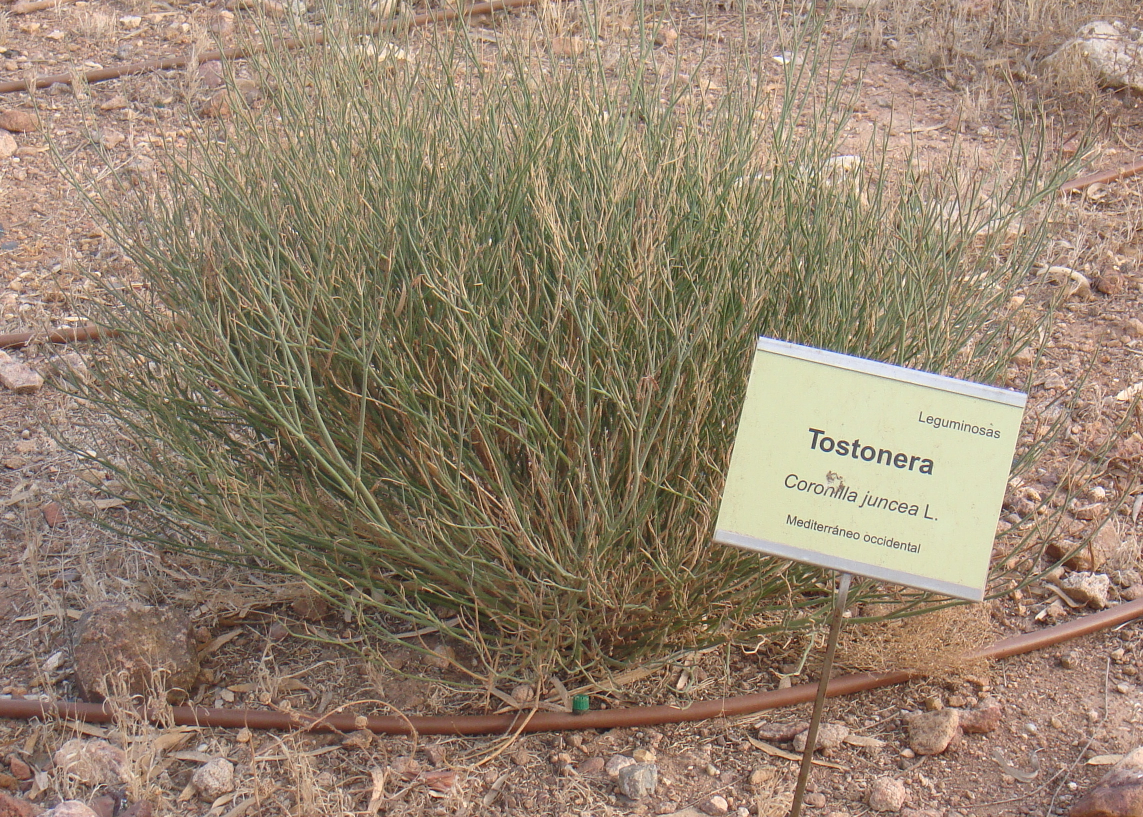 planta en el Jardín Botánico del Albardinal de Rodalquilar, en Nijar, provincia de Almería (España). Se encuentra dentro del Parque natural del Cabo de Gata-Níjar.